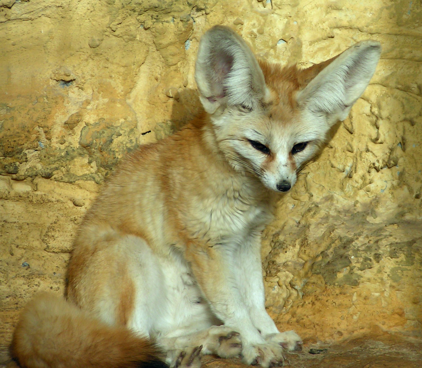 Wüstefuuss an ddem Fuerschungszoo vun der Tel Aviver Universitéit.